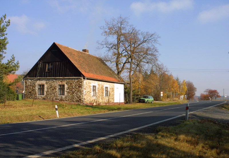 Samota Sokolka nedaleko Plas.